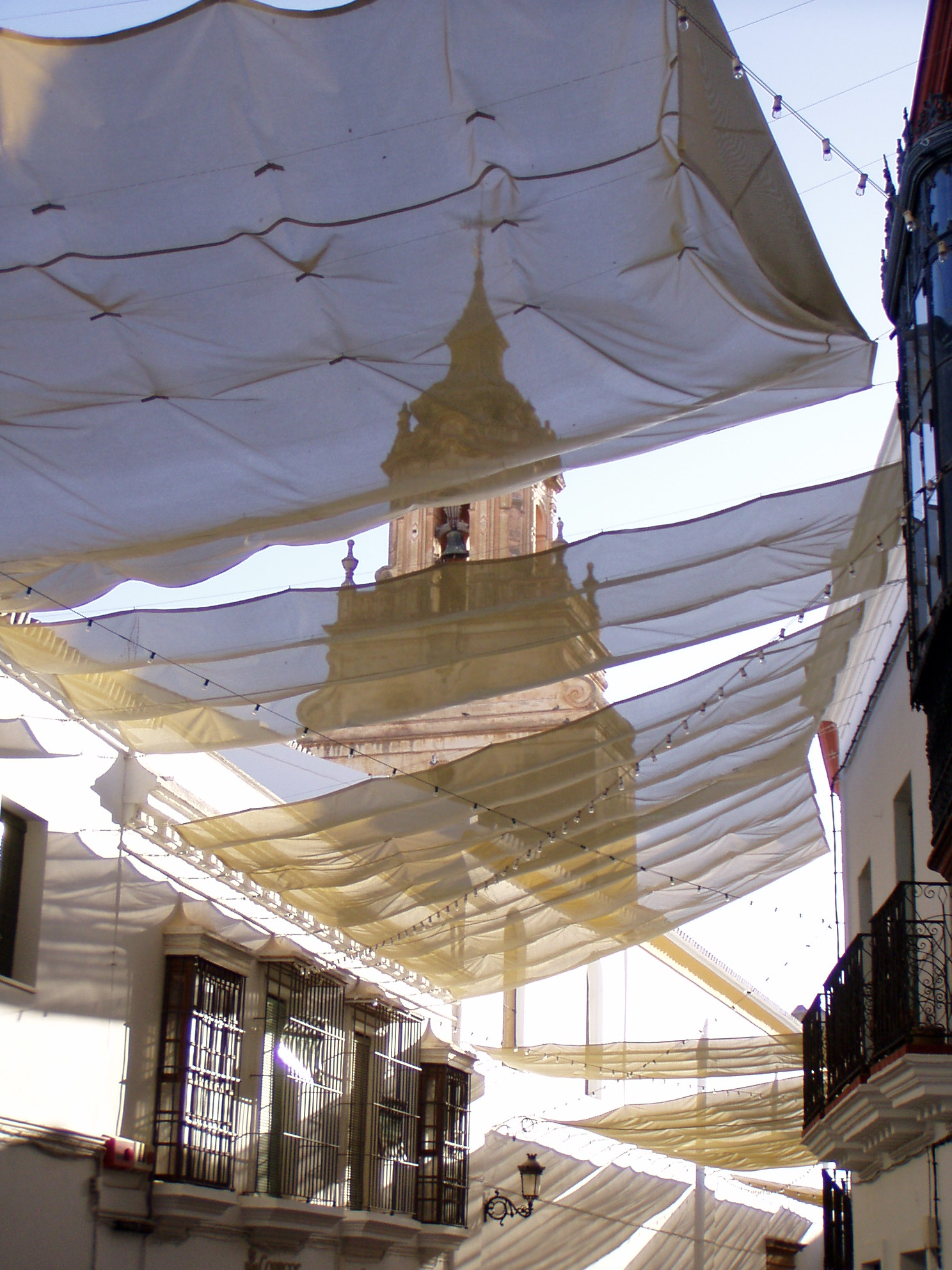 Martin Teetz, September 2005